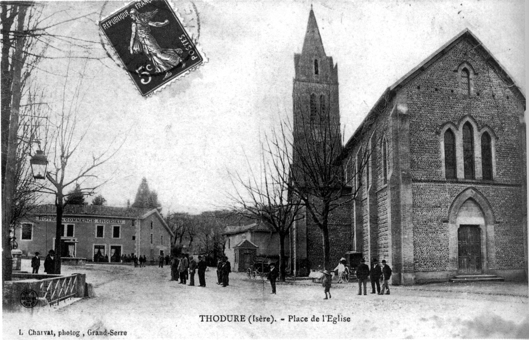 Thodure, place de l'église, 1908. l'église construite de 1863 à 1873 en style néo-gothique en galets disposés en arête-de-poisson alternant avec des lits de tuiles par l'architecte Alfred Berruyer.